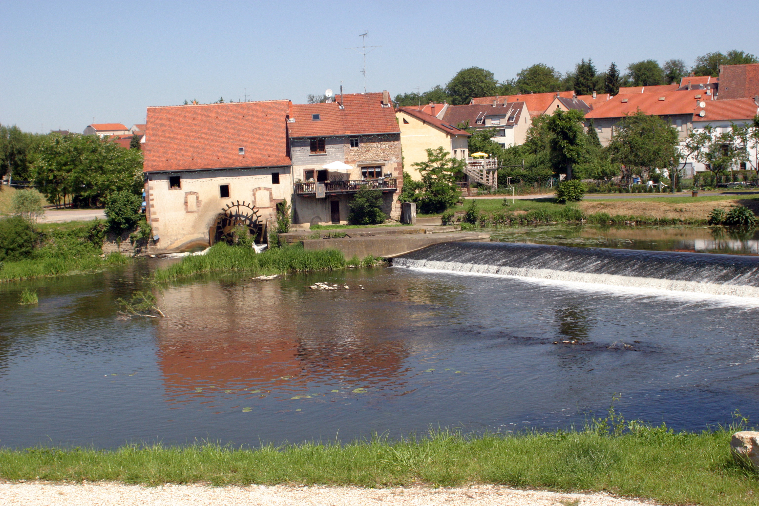 Sarreinsming